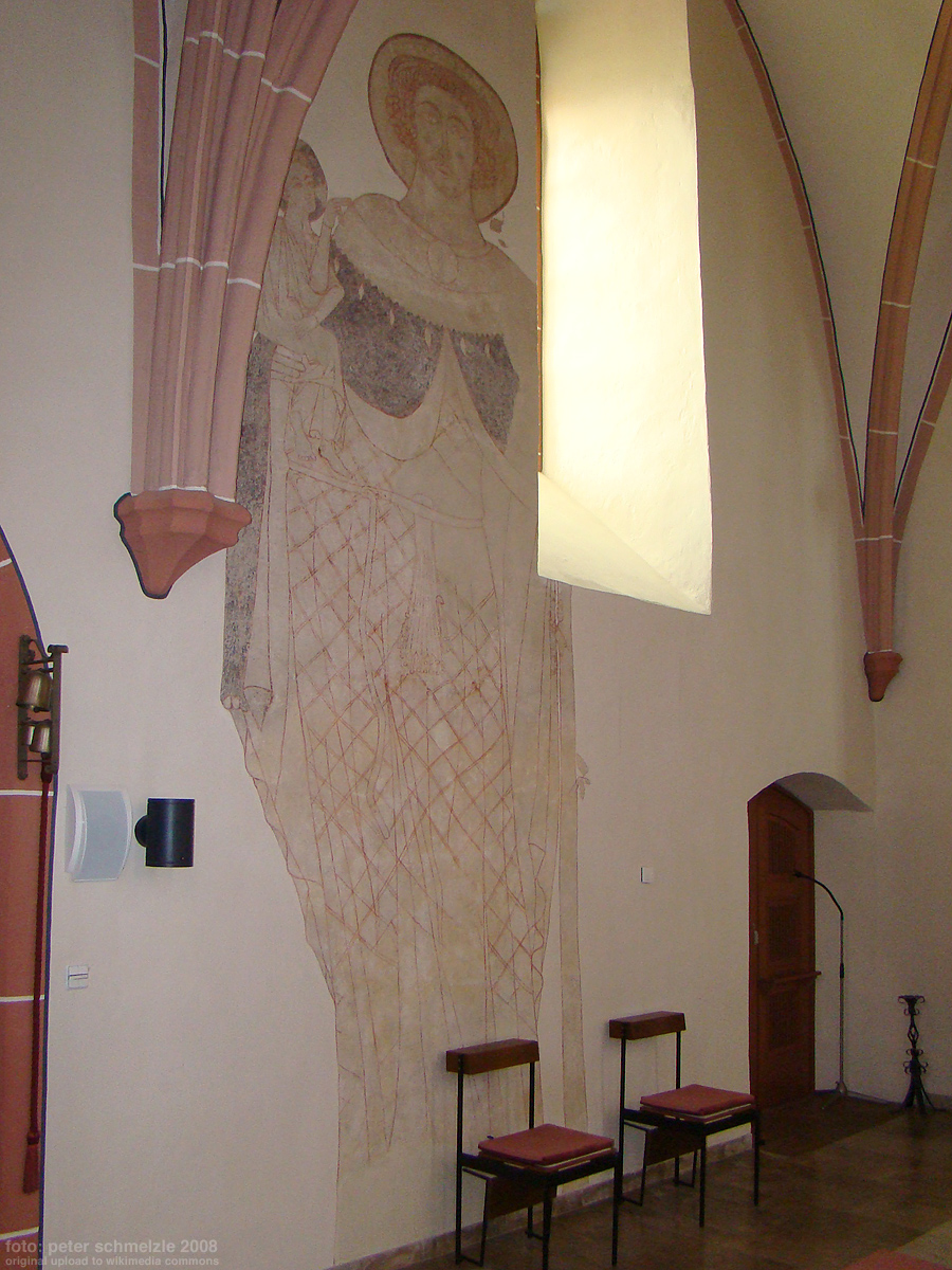 Historisches Fresko des heiligen Christophorus im Chor im Tempelhaus in Neckarelz